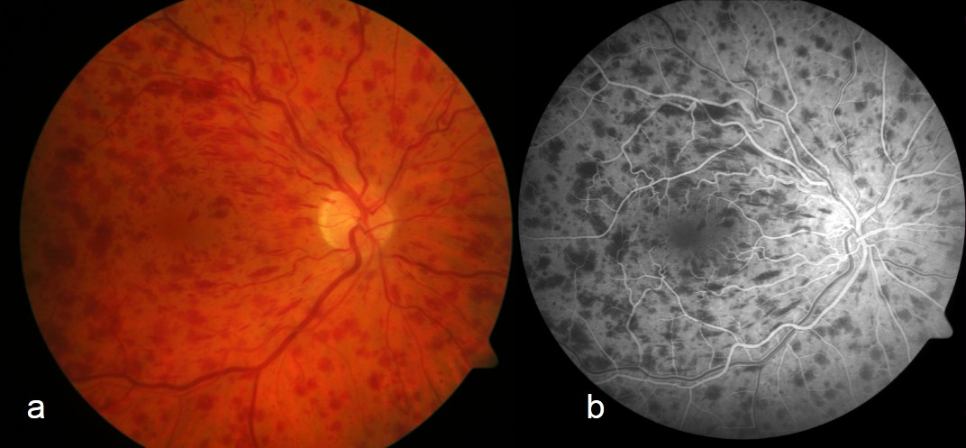 Fig 1. Oclusión Vena Retinal Central. (A)Fondo de ojo con hemorragias intraretinales. (B)Angiografía fluorescente (FA) luego de inyección tinción mostrando bloqueo de fluorescencia coroidal por hemorragias intraretinales.